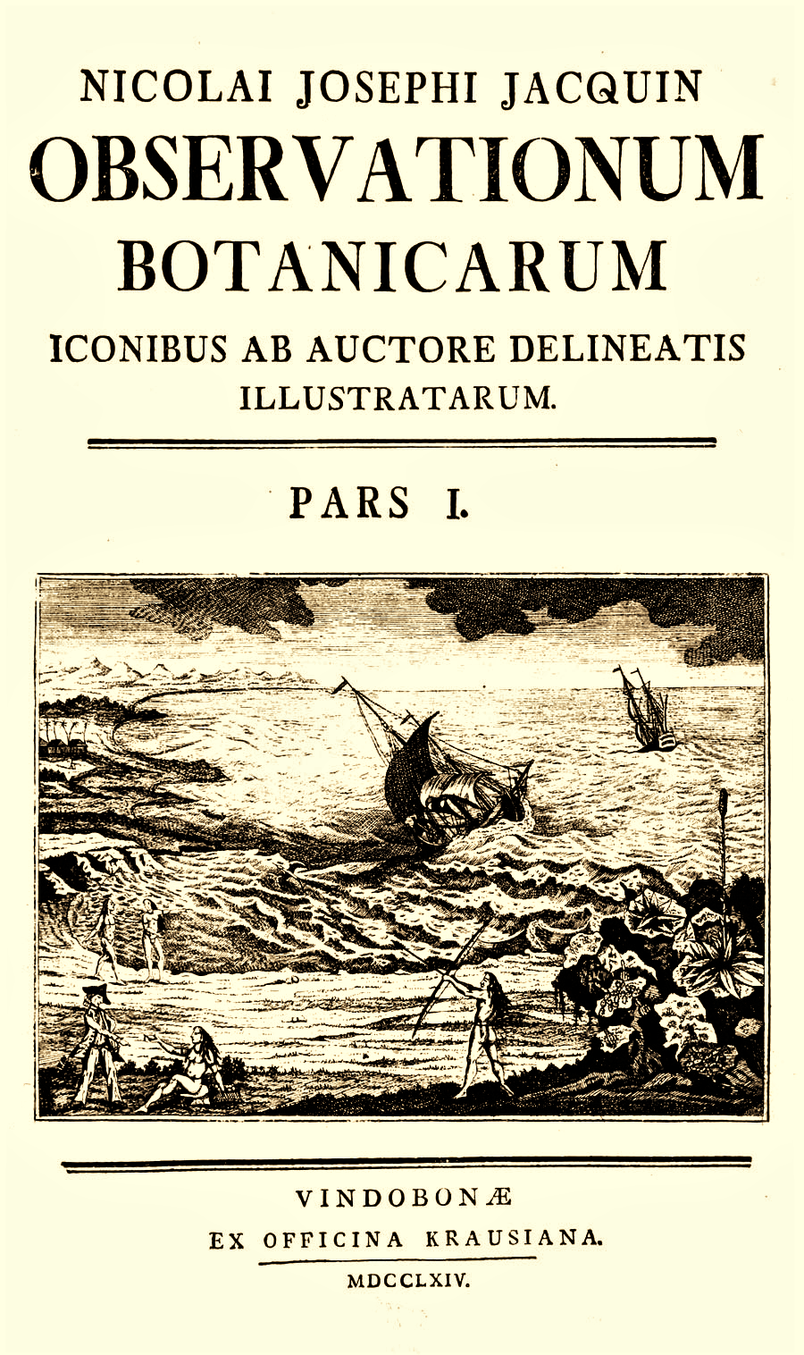 Nikolaus Joseph von Jacquin: Observationum botanicarum, Band 1, Deckblatt